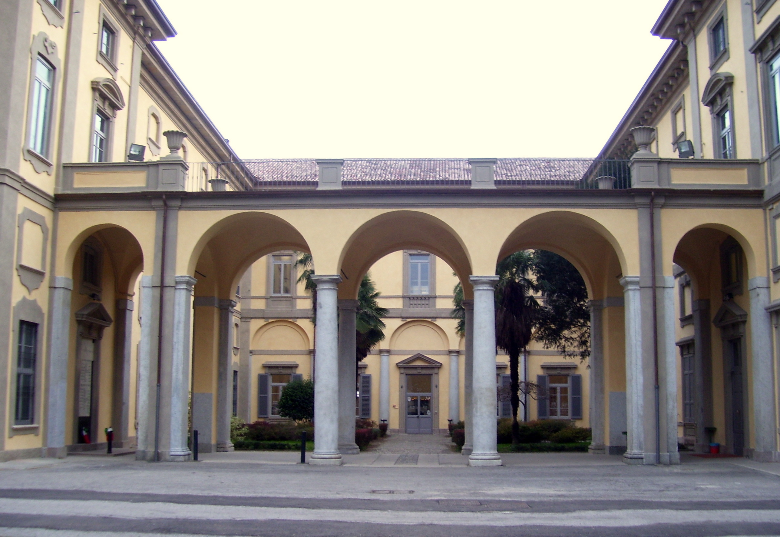 Il portico della settecentesca Villa Pusterla (Limbiate).